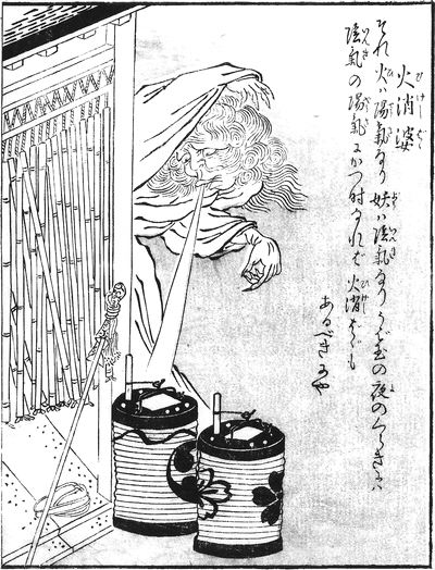 Hikeshibaba (火消婆) from the Konjaku Gazu Zoku Hyakki (今昔画図続百鬼)